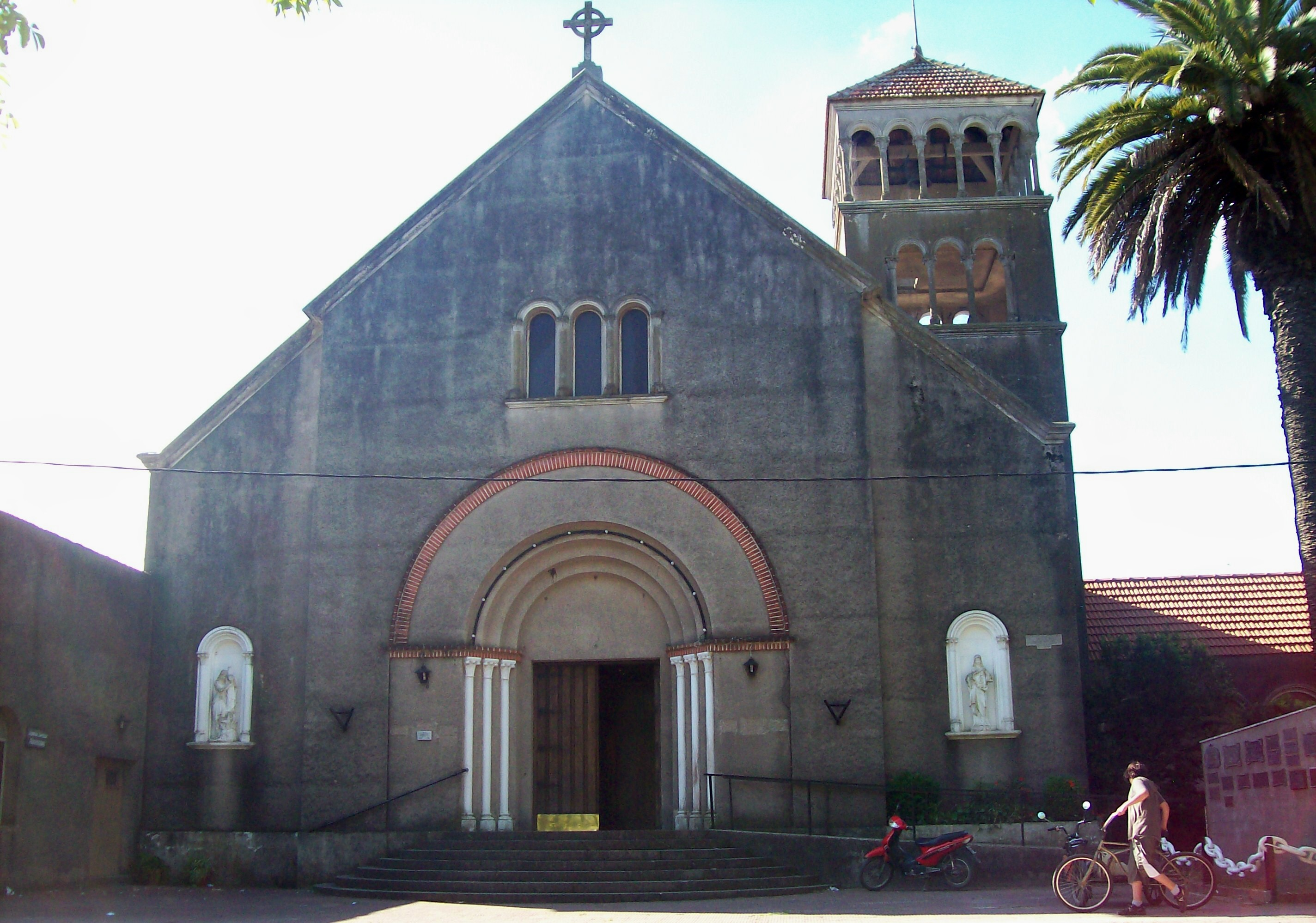 Iglesia de Verónica, en Verónica, pueblo de la provincia de Buenos Aires, Argentina, cerca de La Plata.